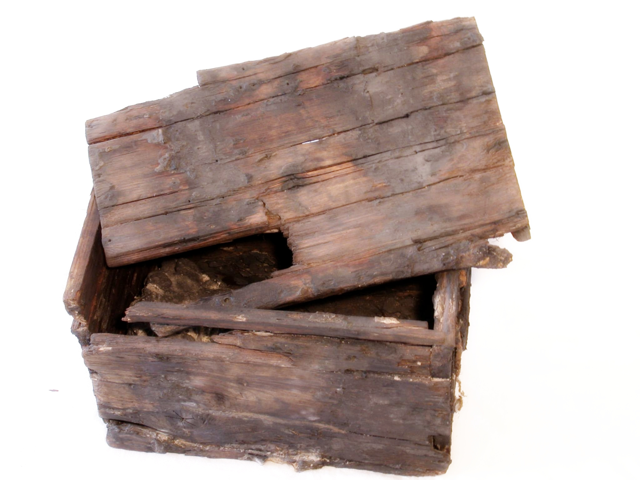 afkomstig uit scheepswrak 'tVliegent Hart. Het schip had drie geldkisten aan boord. Dit is de derde kist die is gevonden. Inhoud bij verzending: - 2.000 Nederlandse gouden dukaten, fragmenten van zakken, Utrecht 1729 (1000 stuk), West-Friesland 1729 (1000 stuks). - 4.820 Spaanse zilverstukken, zakken niet aangetroffen - real de o ocho (4.038 stuks) 1708-1733 voormanelijk Mexico 1730-1733 - real de a cuatro (756 stuks) 1729-1733, Mexico - real de a dos (2 stuks) 17.., Mexico - real (1 stuks) 17.., Mexico